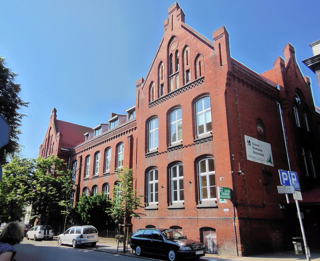 Budynek Schroniska Młodzieżowego w Bydgoszczy przy ul. Sowińskiego